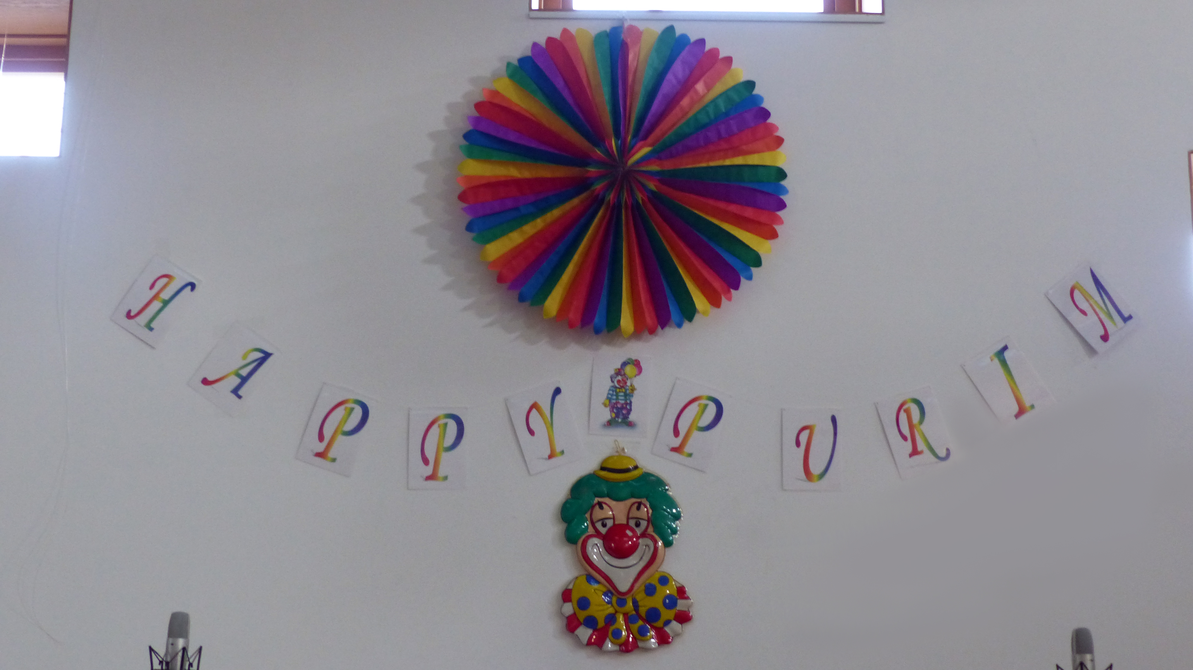 Purim-Fest 2016 in Dresden